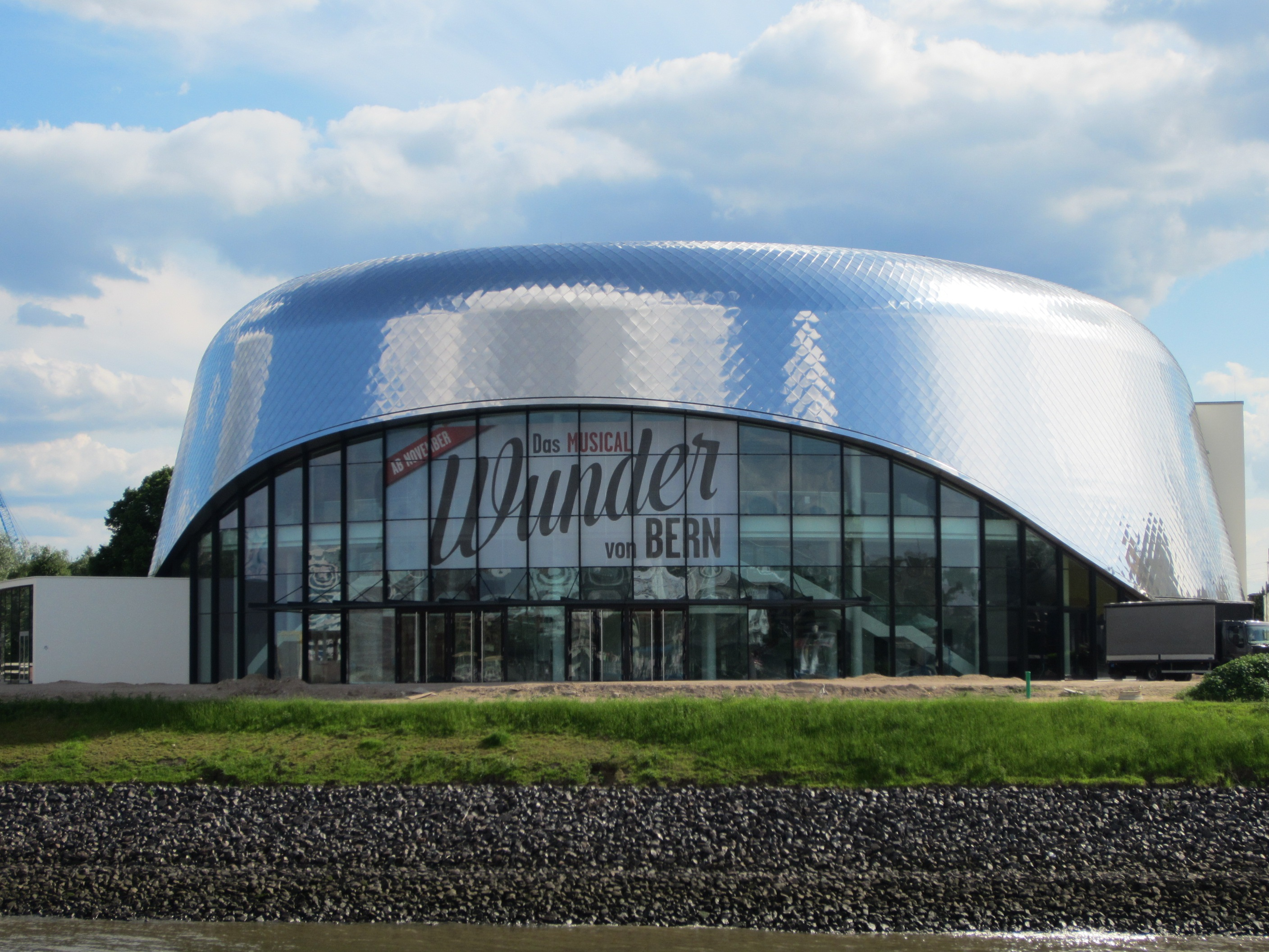 Das Theater an der Elbe Hamburg mit Werbung für das Musical "Das Wunder von Bern".